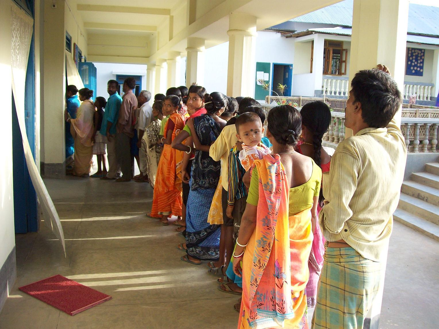 BSS77